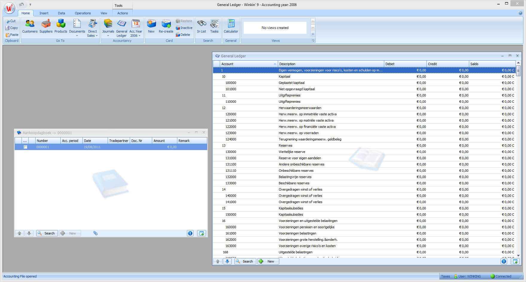 Voorbeeld van een facturatiesoftware Winkin' 9 van ontwikkelaar Winking met daarbij een grootboek en een aankoopdagboek open.